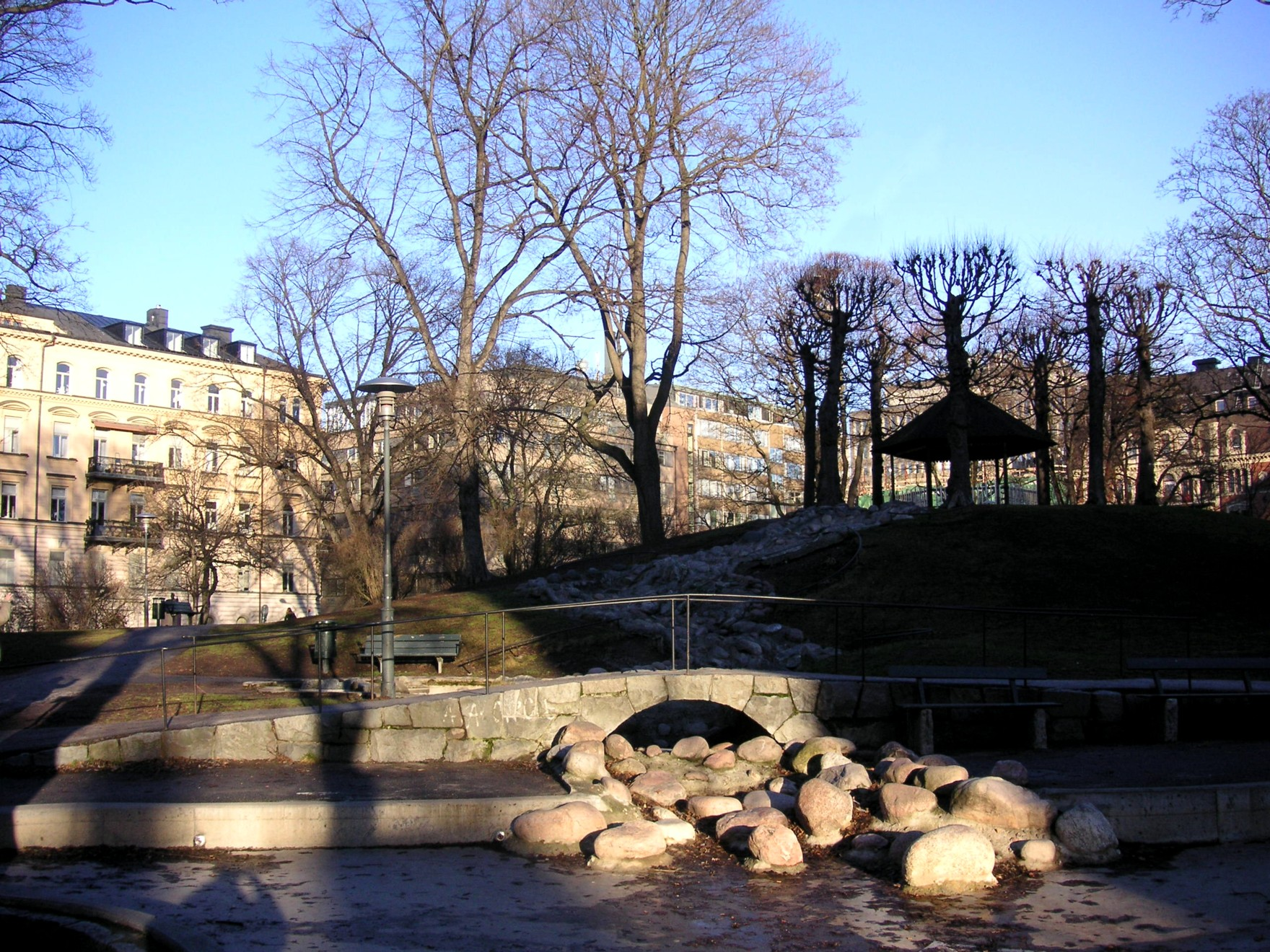 Tegnerlunden i Stockholm